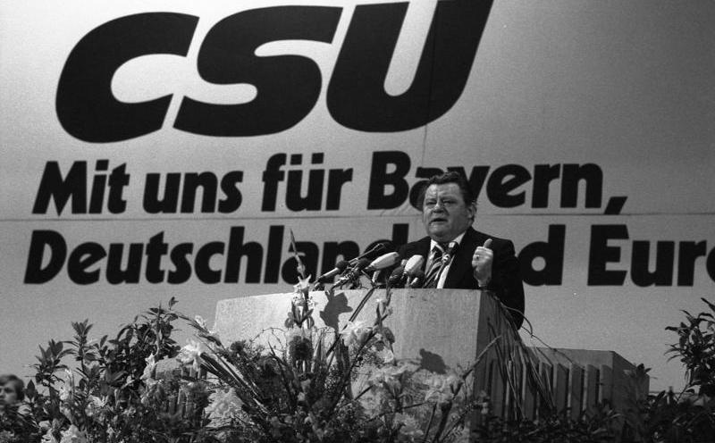 CSU-Vorsitzender Franz-Josef Strauß spricht auf der Aschermittwoch-Kundgebung der CSU in der Nibelungen-Halle Passau